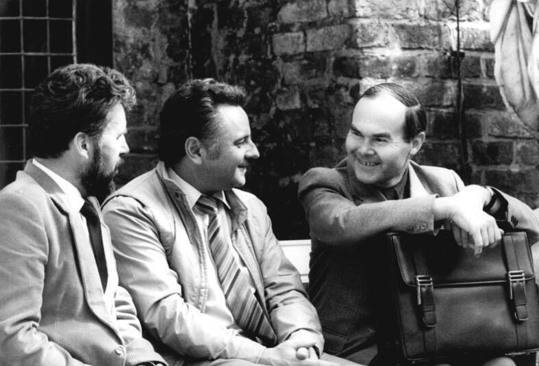 ADN-ZB/Sindermann-29.5.86-Rostock: Wahl Als Mitglied der CDU kandidiert Prof.Dr.sc.theol. Gert Wendelborn (r.), Außerordentlicher Professor an der Sektion Theologie der Wilhelm-Pieck-Universität Rostock, wieder für die Volkskammer der DDR. Für seine erfolgreiche Tätigkeit als Volksvertreter ist das Gespräch mit Parteifreunden sehr wichtig. Links: Dr. Siegfried Metzner, Kreisarzt in Greifswald und Vorsitzender der Arbeitsgruppe Christliche Kreise. Mitte: Dieter Klemm, Vorsitzender des CDU-Bezirksvorstandes Rostock und Mitglied des Bezirkstages.